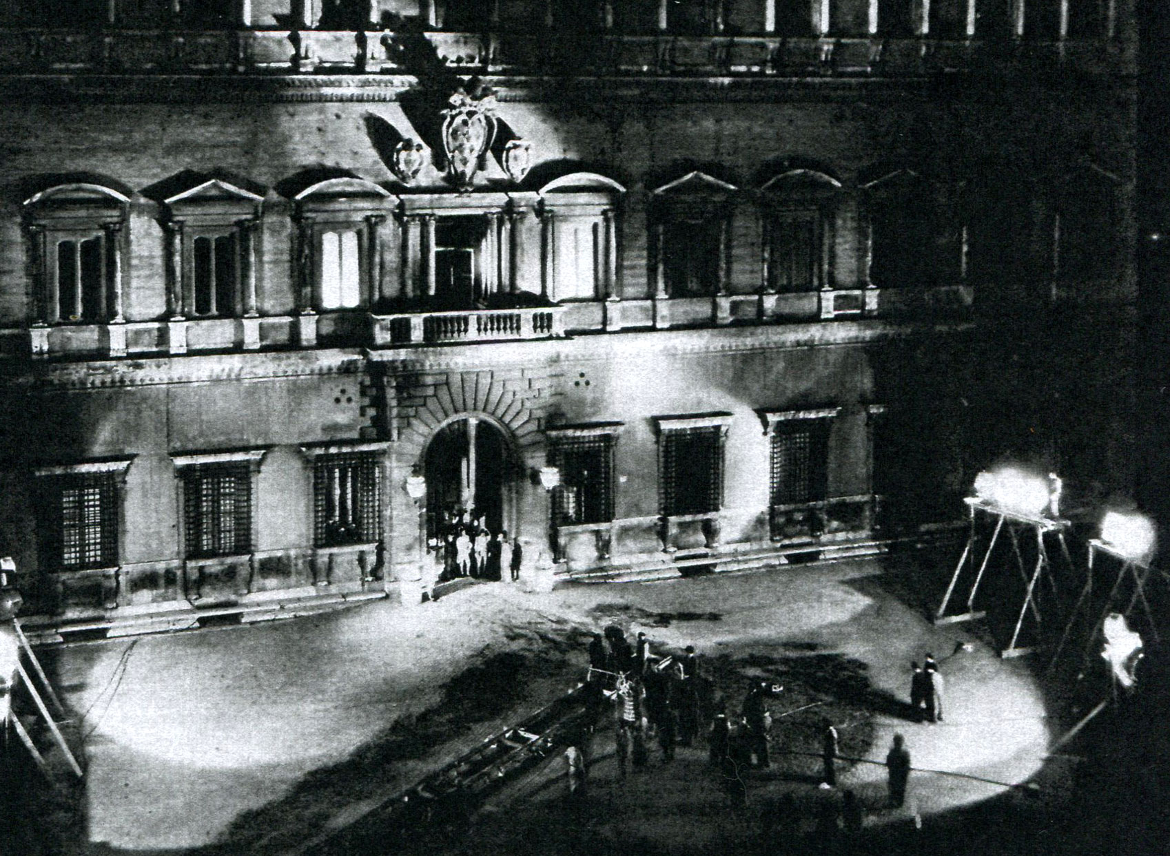 Tosca (Renoir + Koch, 1941) - set del film in piazza Farnese - Roma